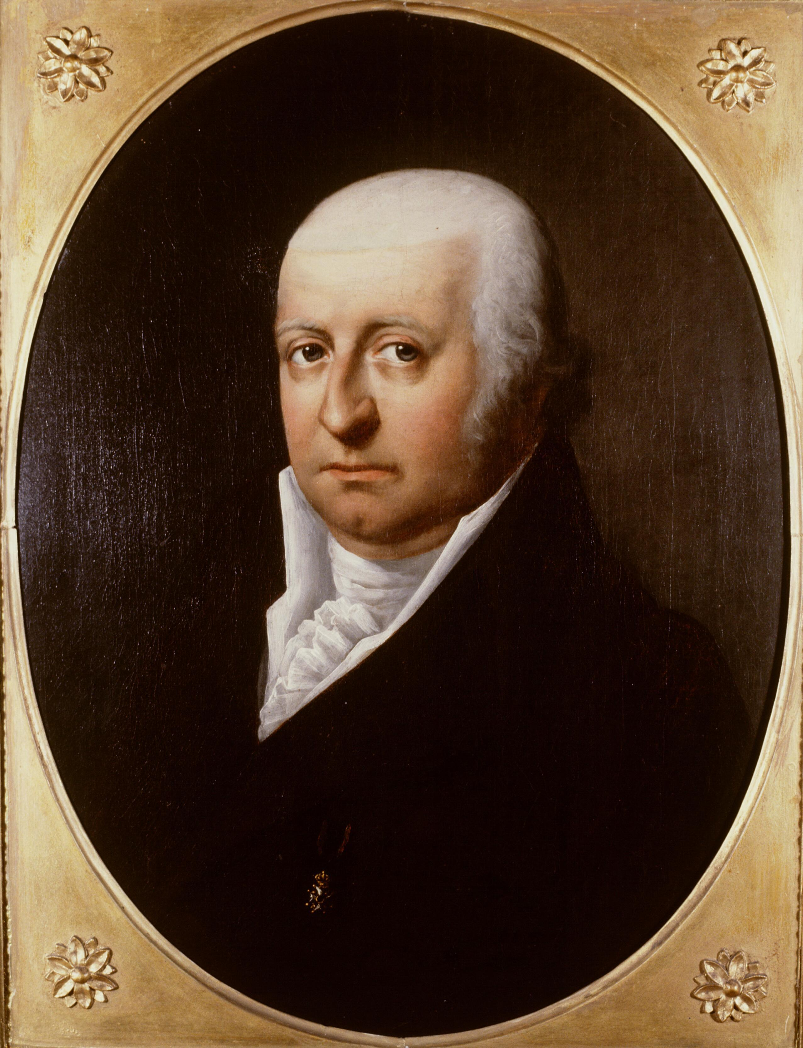 Portret van Jacob van der Dussen (1763-1820) ca. 1815-1820 datering gebaseerd op kapsel en overlijdensjaar voorgestelde